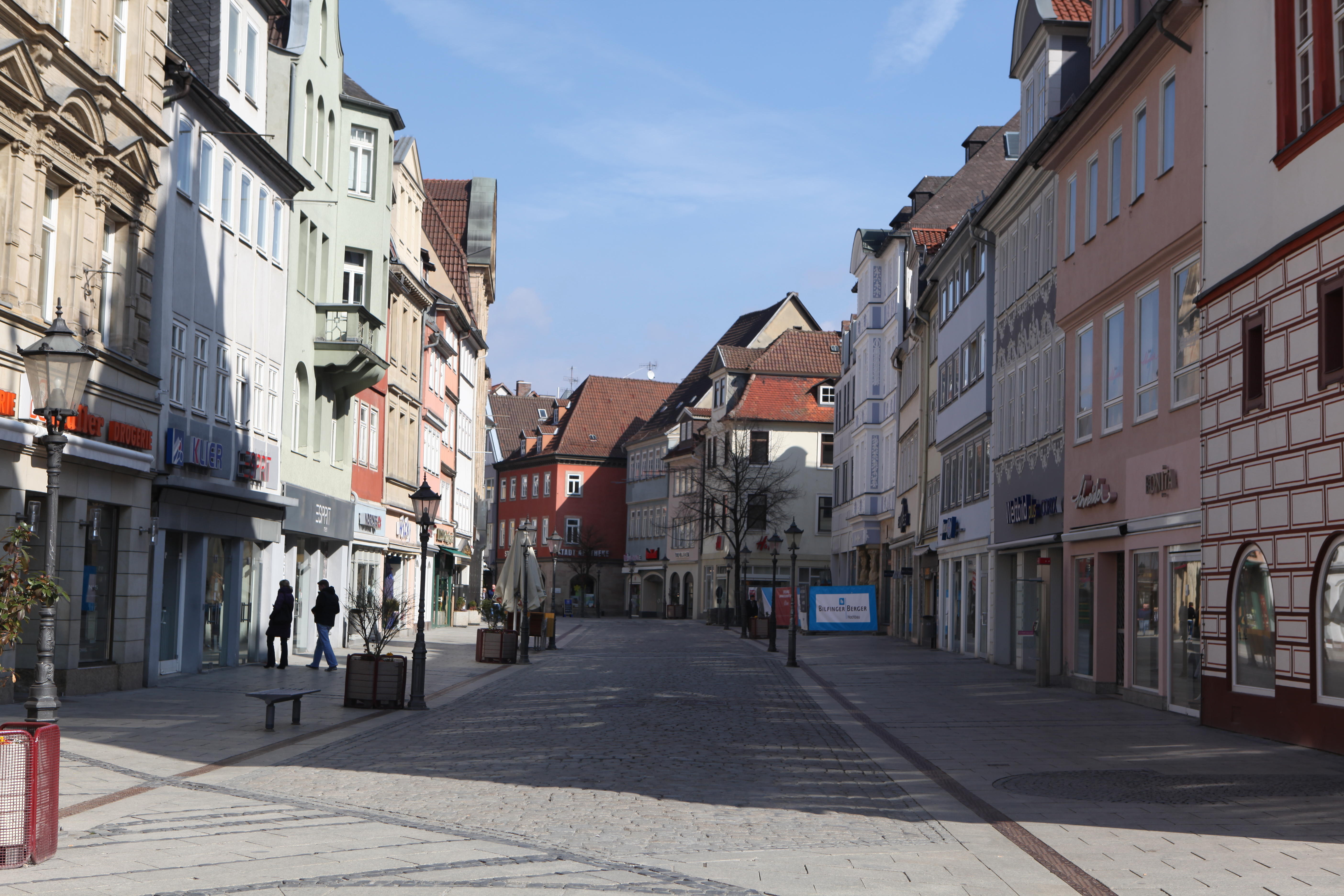 Spitalgasse in Coburg